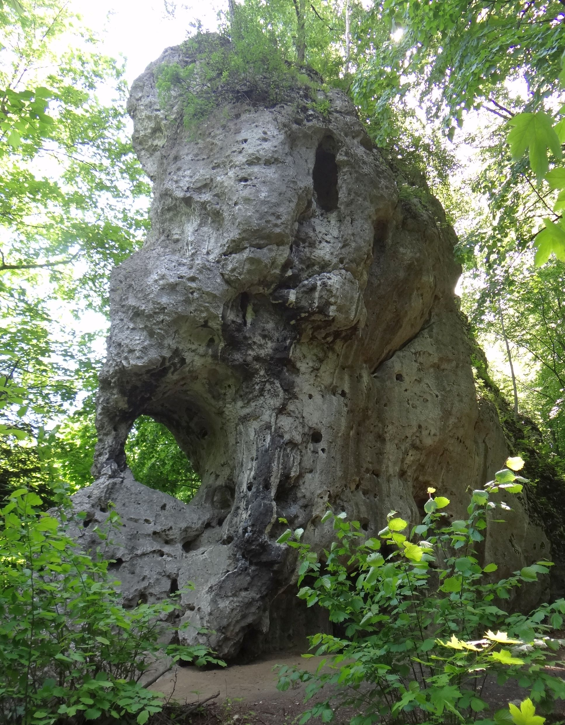 Skała Oczko w Parku Jurajskim koło smolenia